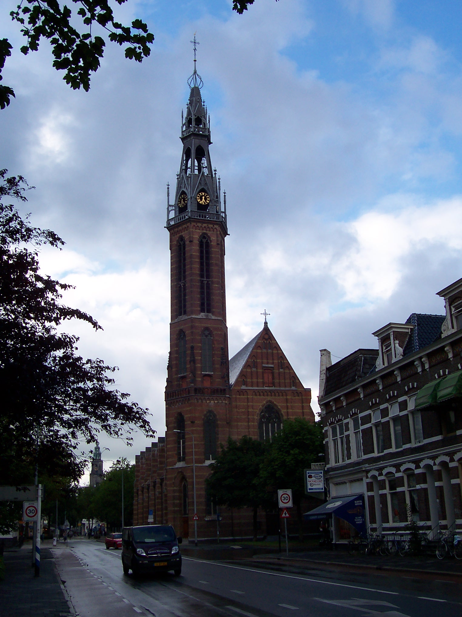 Groningen, Kathedrale kerk van de HH. Martinus en Jozef (Sint-Jozefkathedraal)